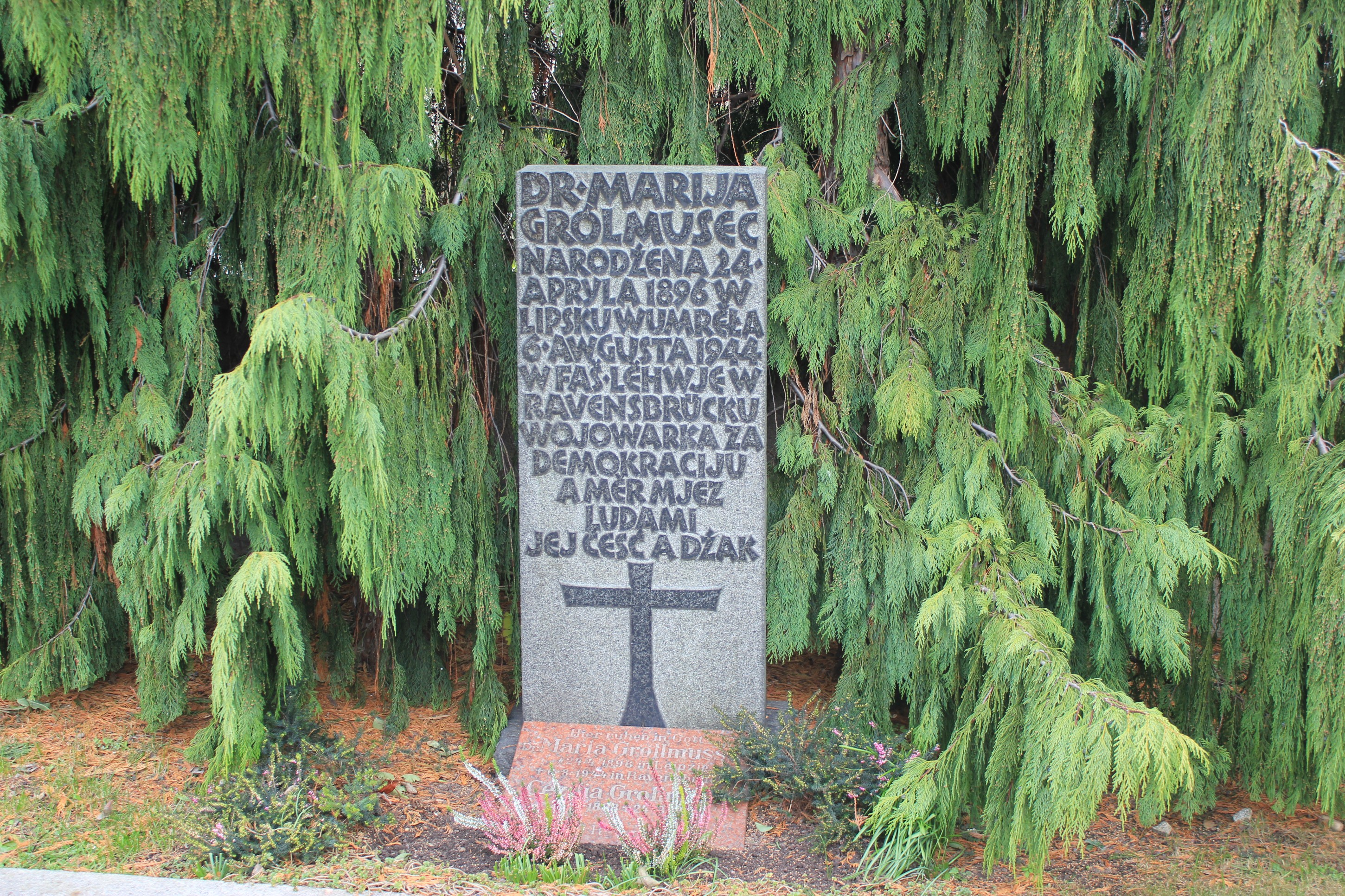 Hornjoserbsce: Na Radworskim kěrchowje; pomnik Marje Grólmusec.